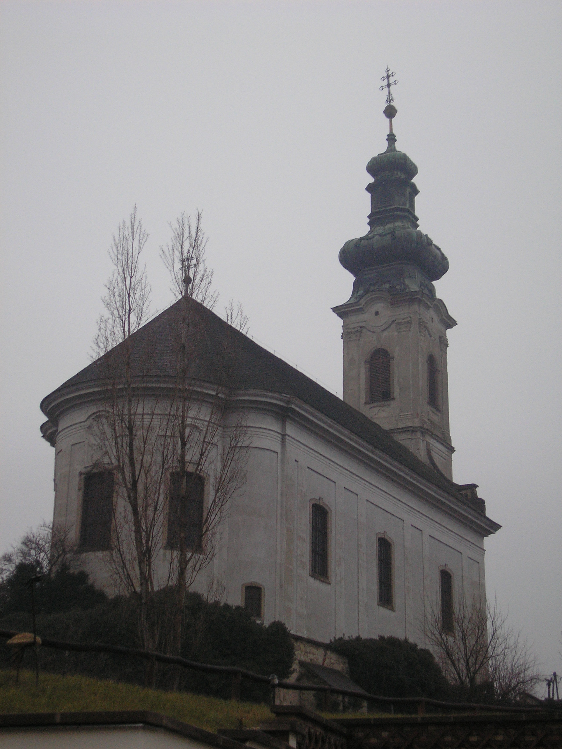 rác templom eger